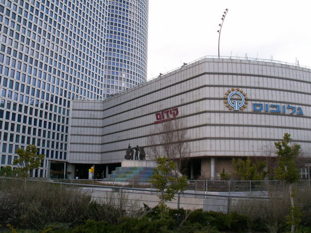 מרכז עזריאלי ת"א Azriely Towers - Tel-Aviv - Israel צולם על-ידי אבי קדמי ב- 2006.